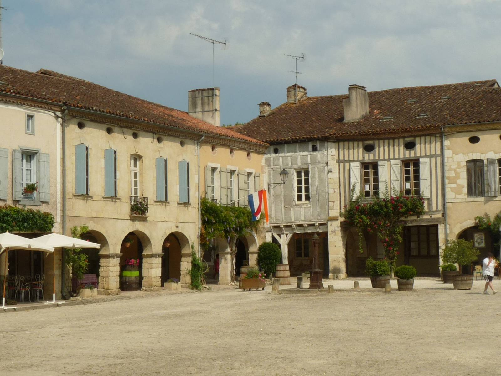 Place Royale, Labastide-d'Armagnac, Landes, France